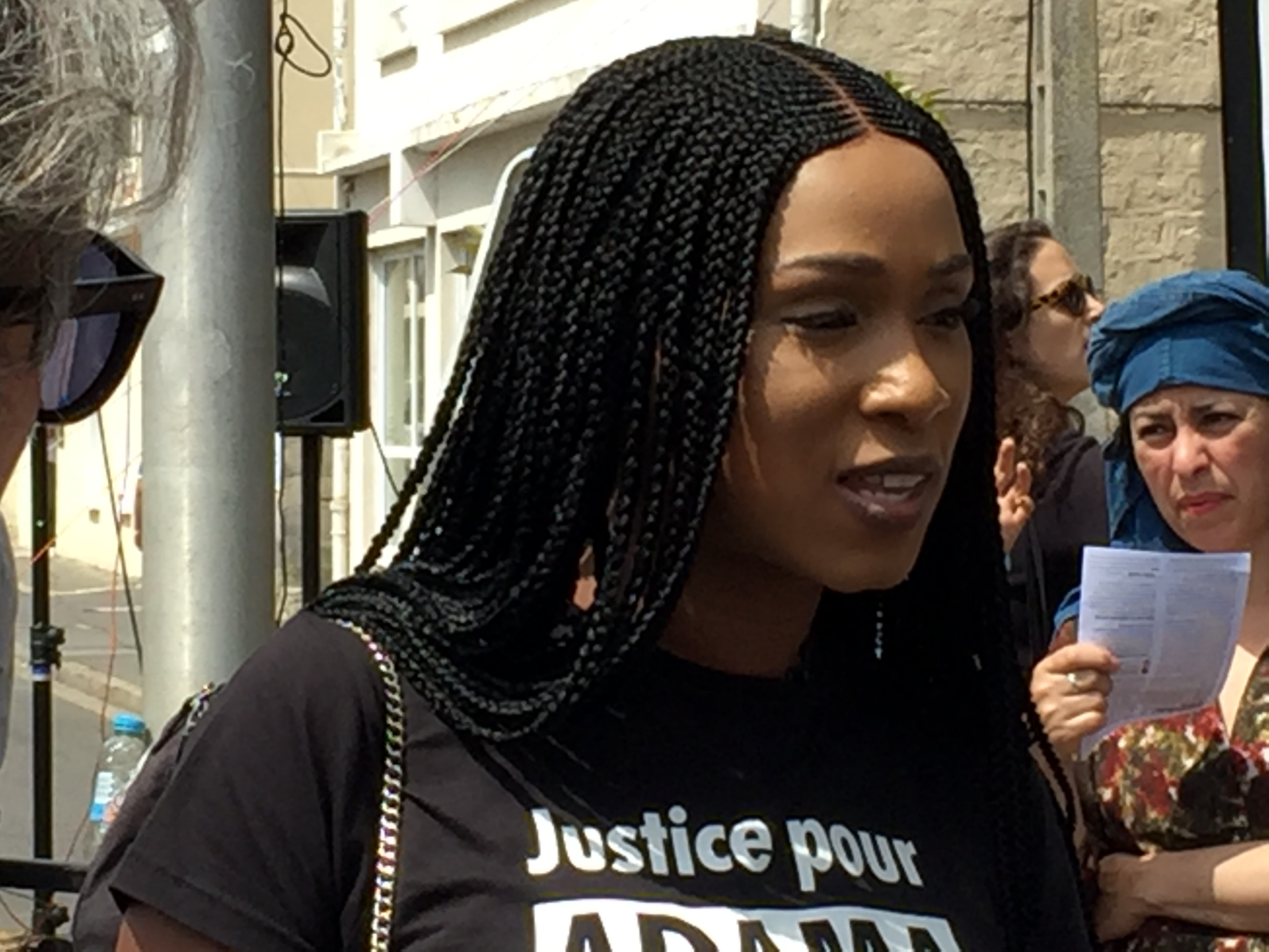 Assa Traoré au départ de la « Marche pour Adama » à proximité de la gare de Persan, vers 14h le 21 juillet 2018.